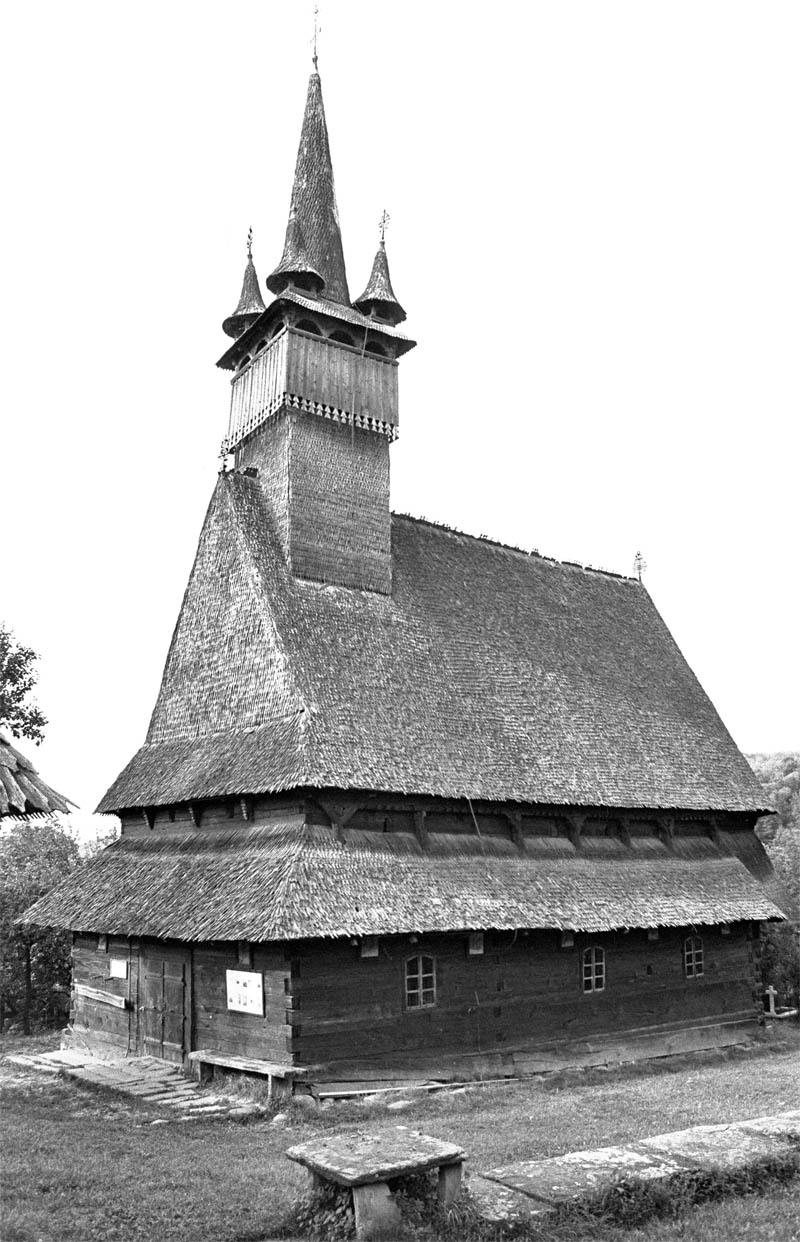 Biserica din Budesti Josani, Maramures